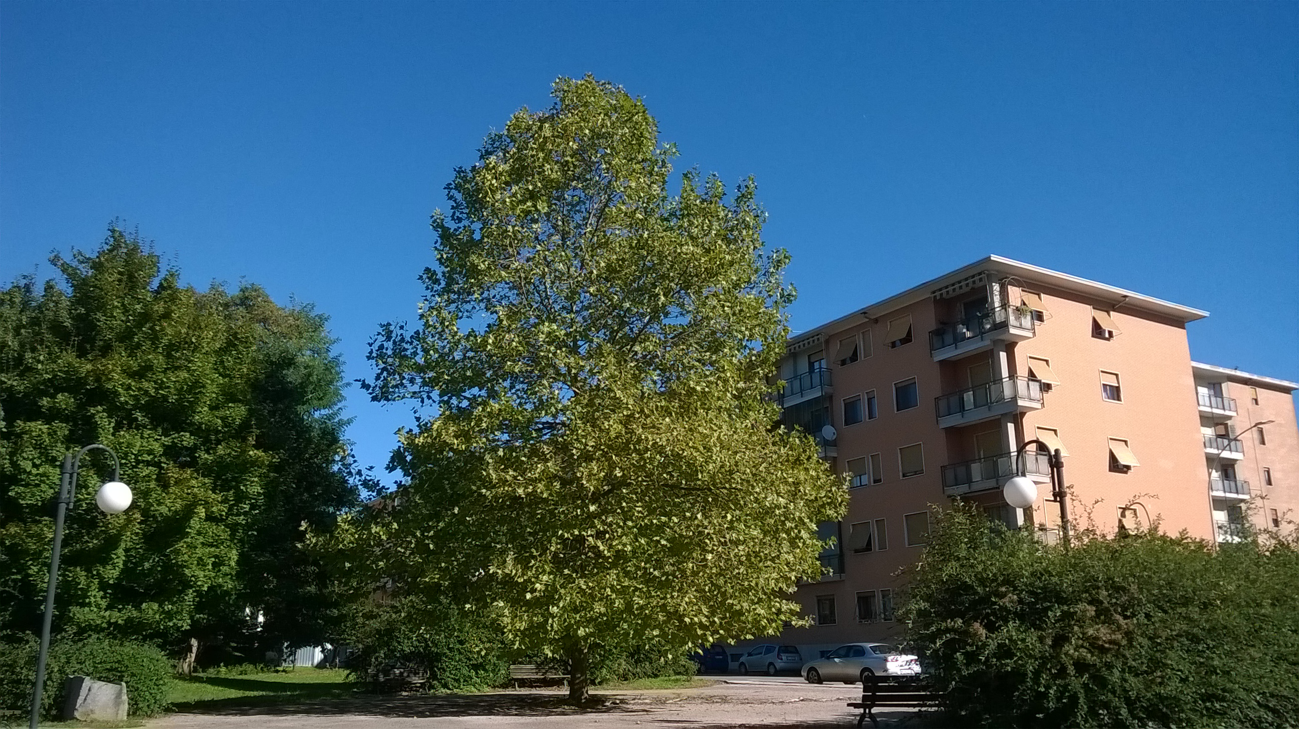 I giardini intitolati a Padre Giovanni Brevi, inaugurati nel 1999